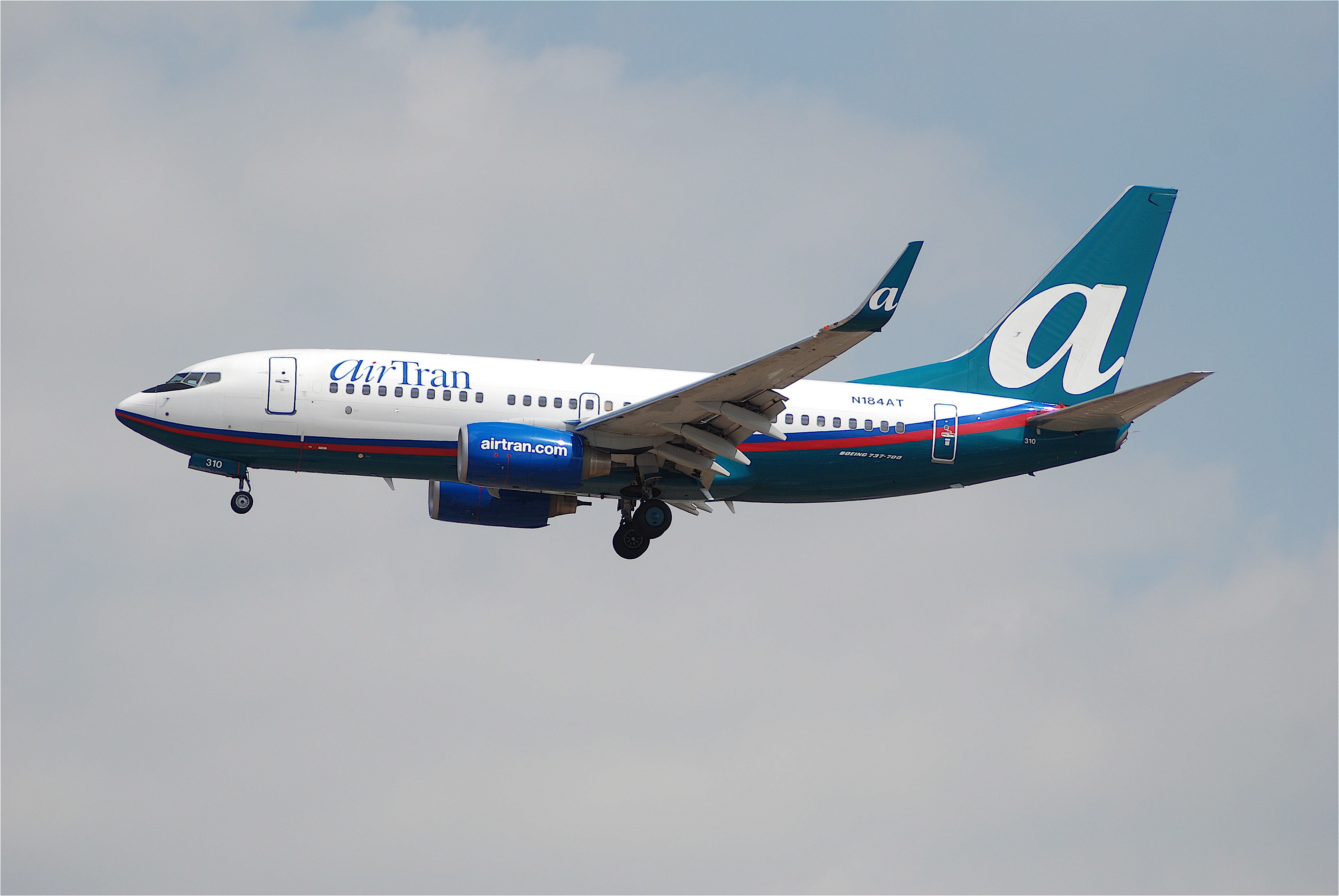 Airtran Boeing 737-700; N184AT@LAX;21.04.2007/466hy